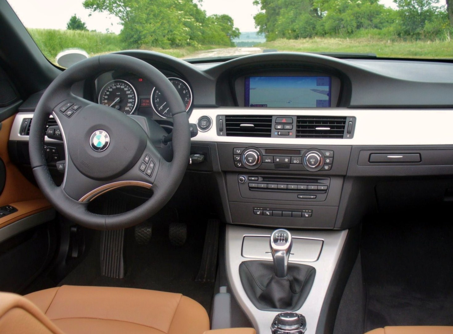 BMW E93 325i